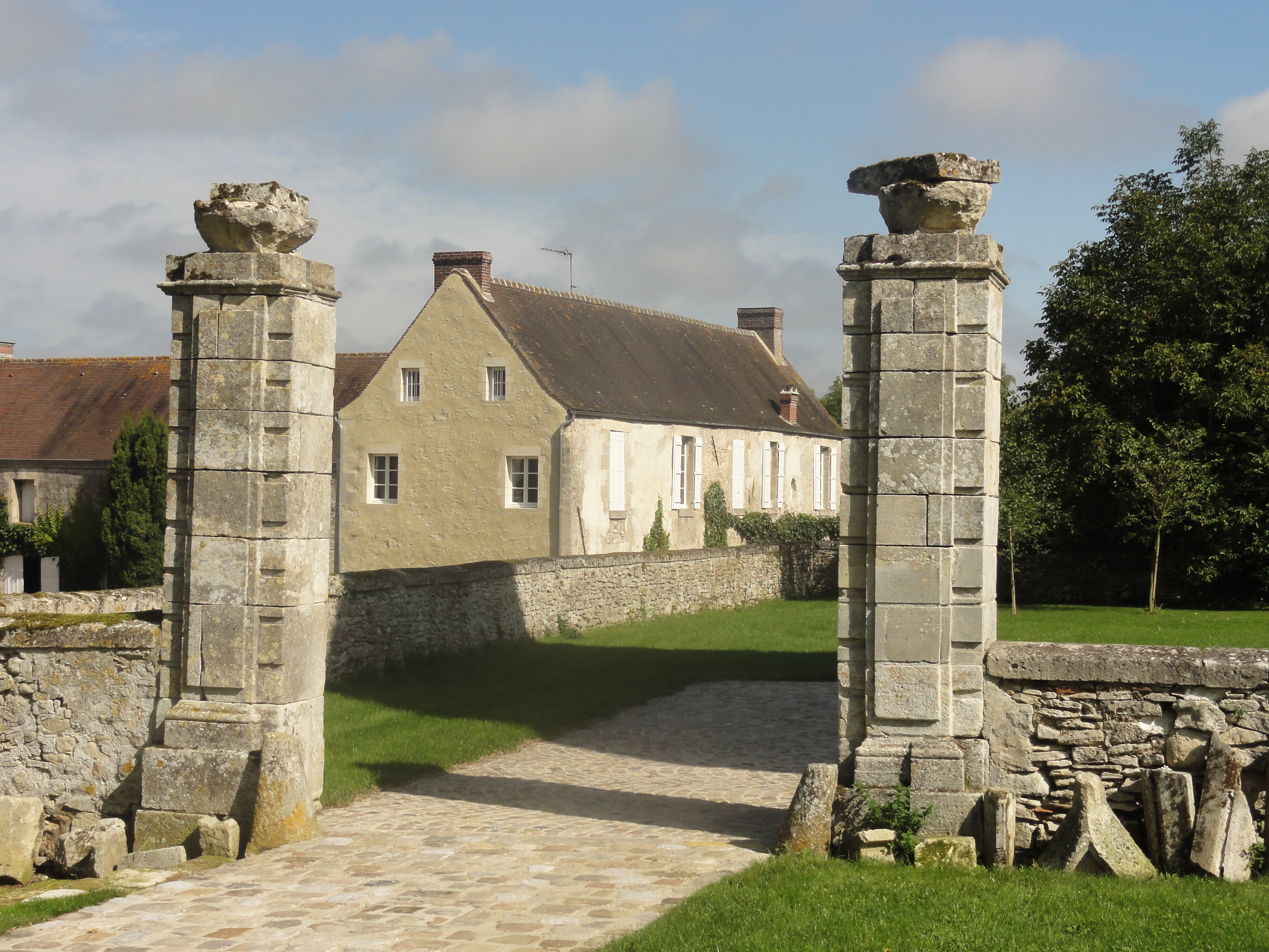 Ancien portail intérieur.